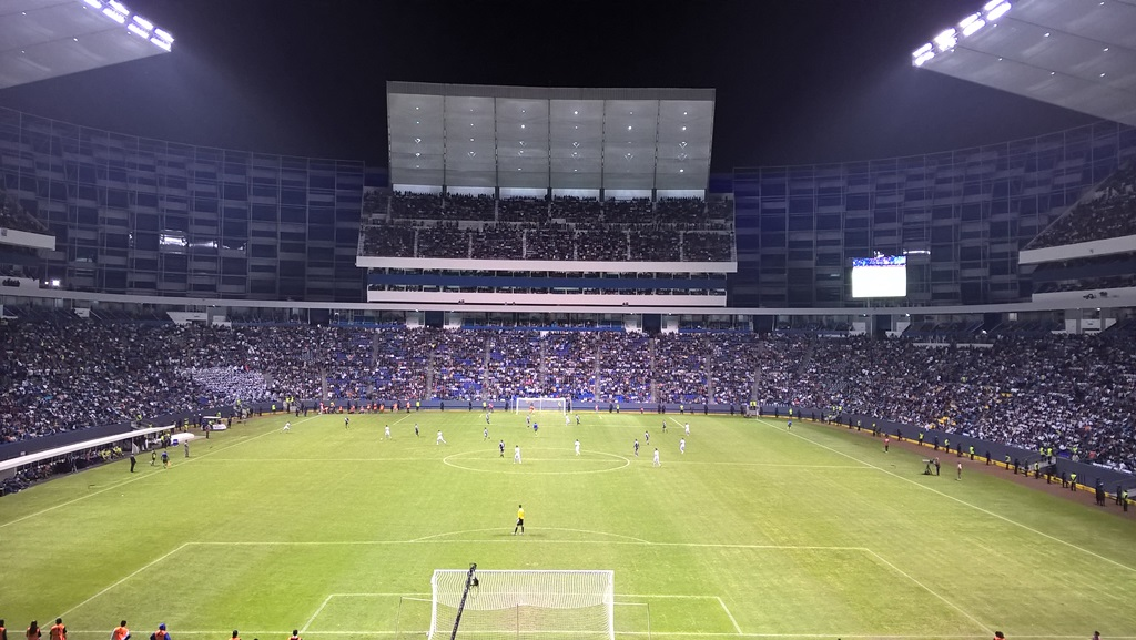 Vista de la rampa norte en el partido re-inaugural